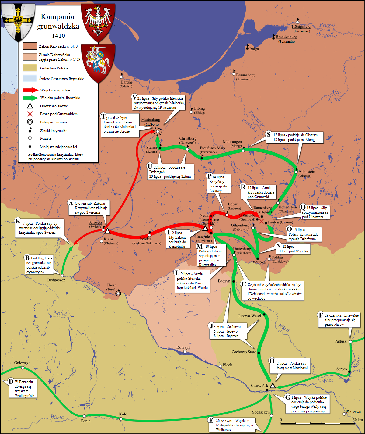 Kampania grunwaldzka w 1410 roku